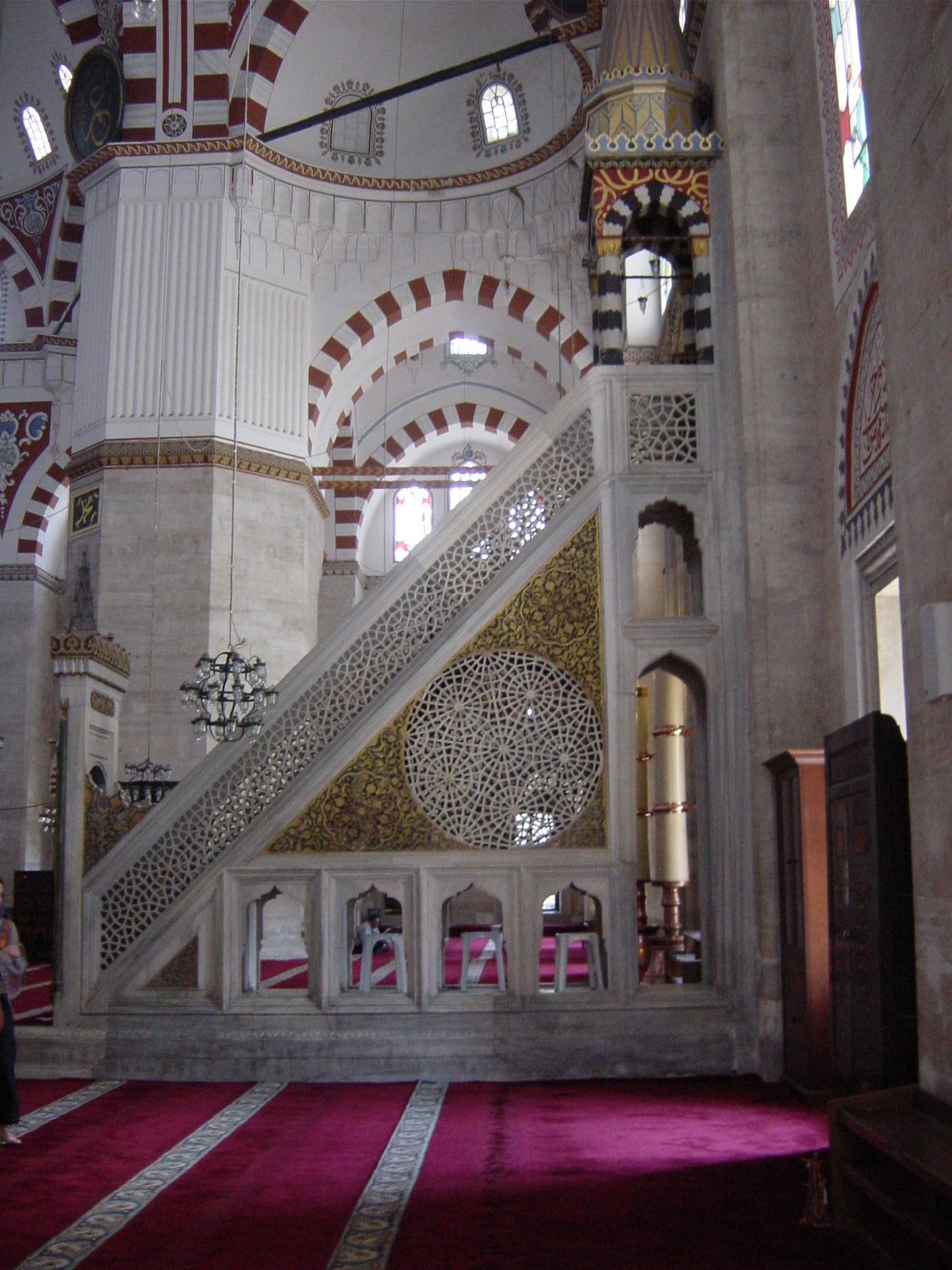 Pulpito (minbar) della Moschea detta Sehzade camii ad Istanbul. Foto di: Giovanni Dall'Orto, 29-5-2006.